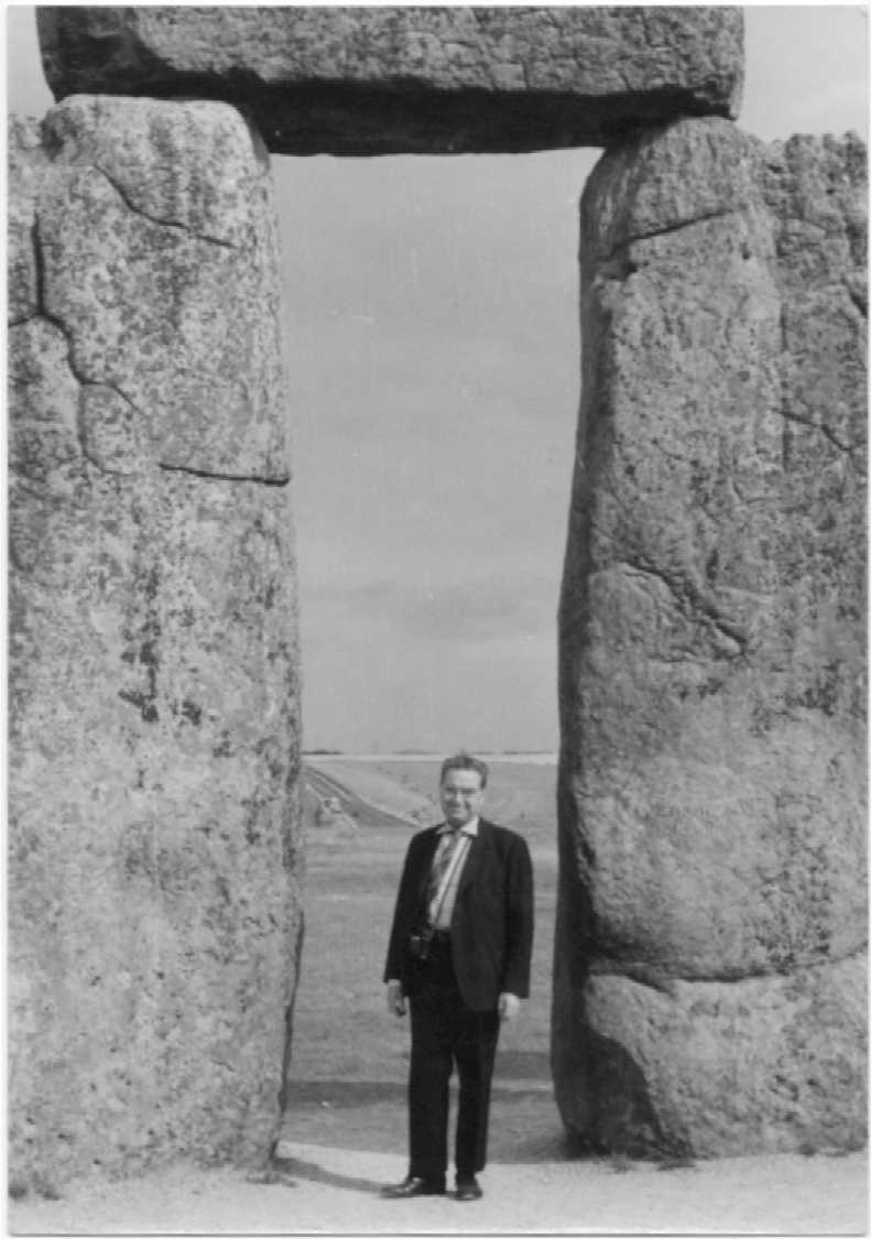 L'arqueòleg i historiador Joaquim Font i Cussó en una visita a Stonghenge. Arxiu familiar.